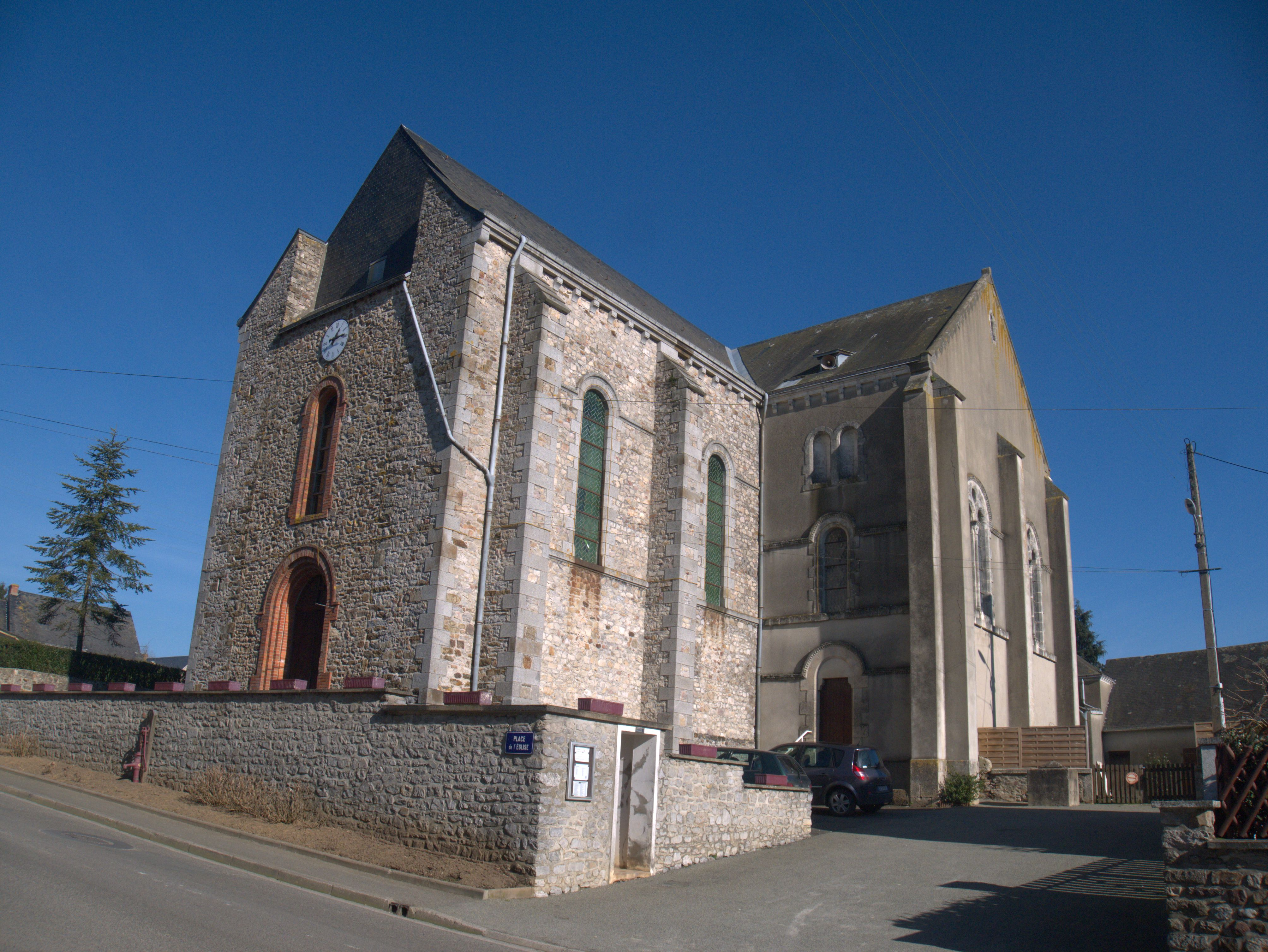 Voutré église vue de l'extérieur